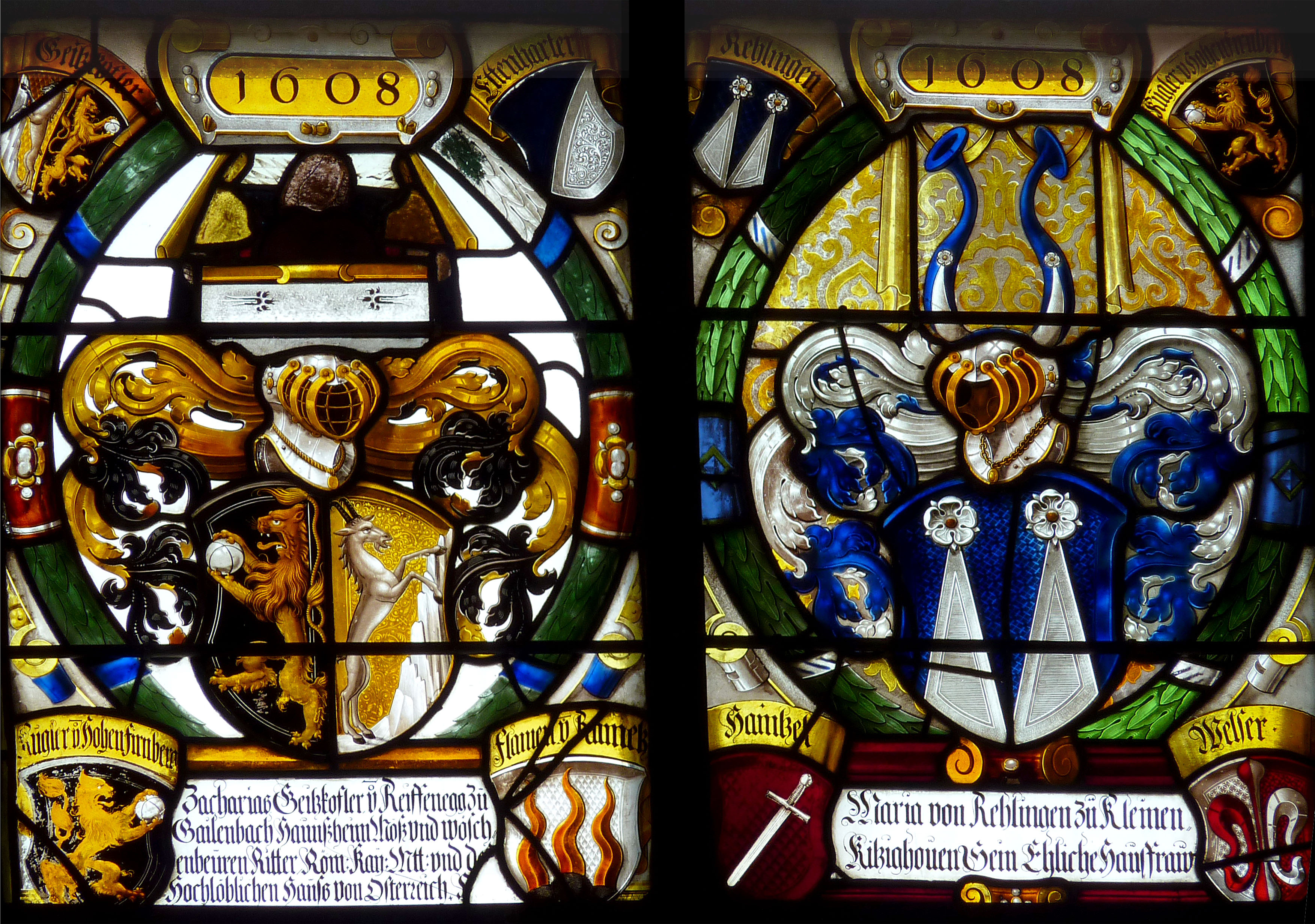 Evangelisch-lutherische Dreifaltigkeitskirche in Haunsheim, einer Gemeinde im Landkreis Dillingen an der Donau (Bayern), Fenster mit den Wappen der Erbauer, der Familien Rehlingen-Geizkofler von 1608, von dem Augsburger Glasmaler Achilles Miller